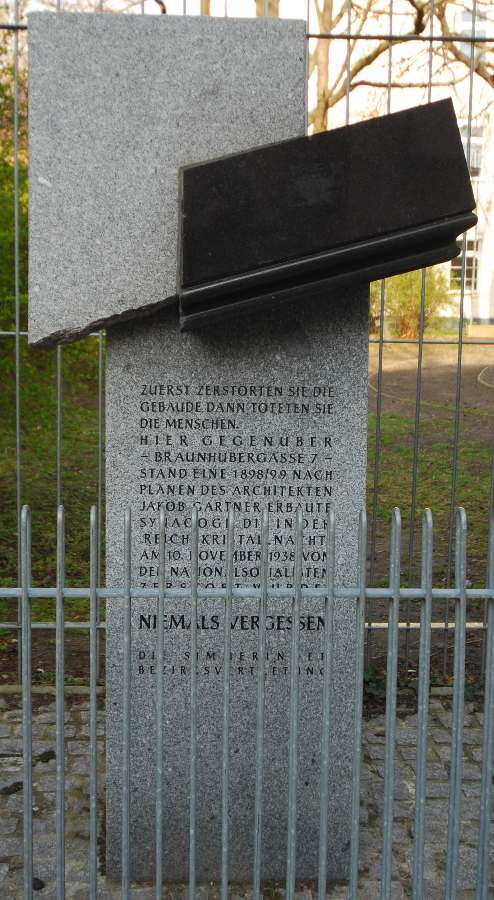 Gedenkstein an der Kreuzung Braunhubergasse / Hugogasse in Wien-Simmering zum Gedenken an eine während der Reichskristallnacht von den Nationalsozialisten zerstörte jüdische Synagoge